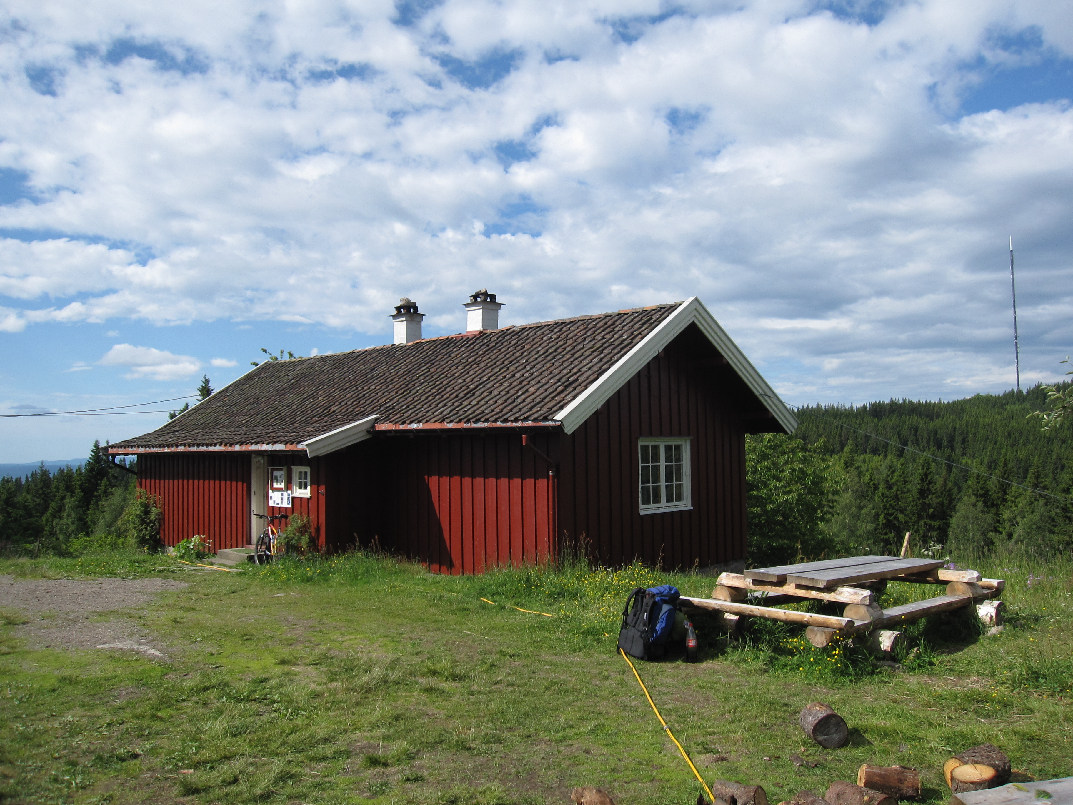 Frønsvollen seter drives i dag av Naturvernforbundet i Oslo og Akershus og har etter gjenåpningen i 2007 blitt et populært stoppested for de mange turgåere i Nordmarka, her finner man rasteplass, utedo og rent drikkevann. Seteren har også kyr som beiter i det bratte terrenget rundt vollen. --- After re-opening in 2007, Frønsvollen summer pasture has become a popular resting place for hikers in Nordmarka. Here they can sit down for a rest, get fresh drinking water, use the facilities or just watch the cows grazing on the steep hills around Frønsvollen.